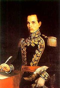 Retrato de José de Fábrega (1774-1841)